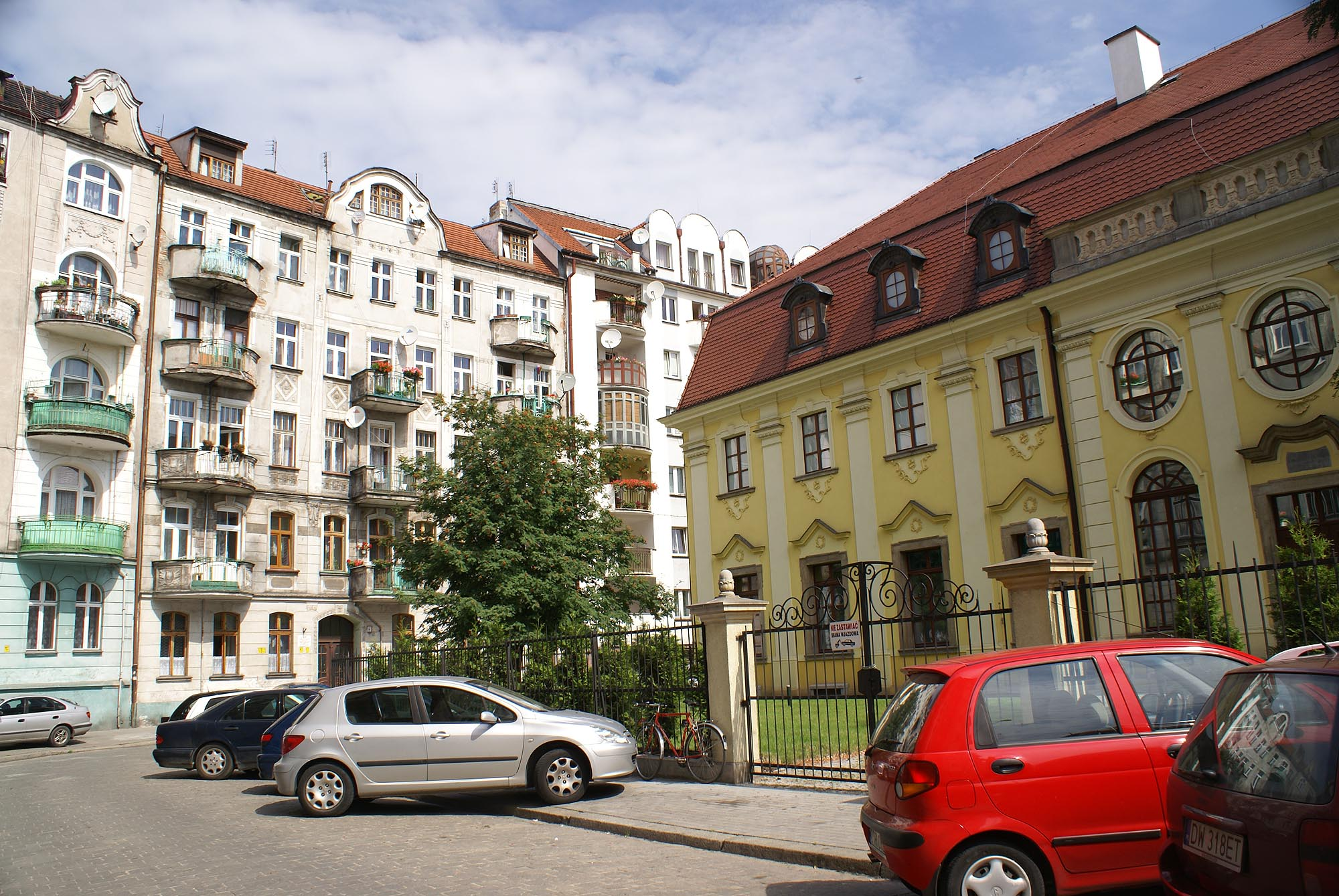 Wrocław, układ urbanistyczny Przedmieścia Oławskiego, XIII, XIX